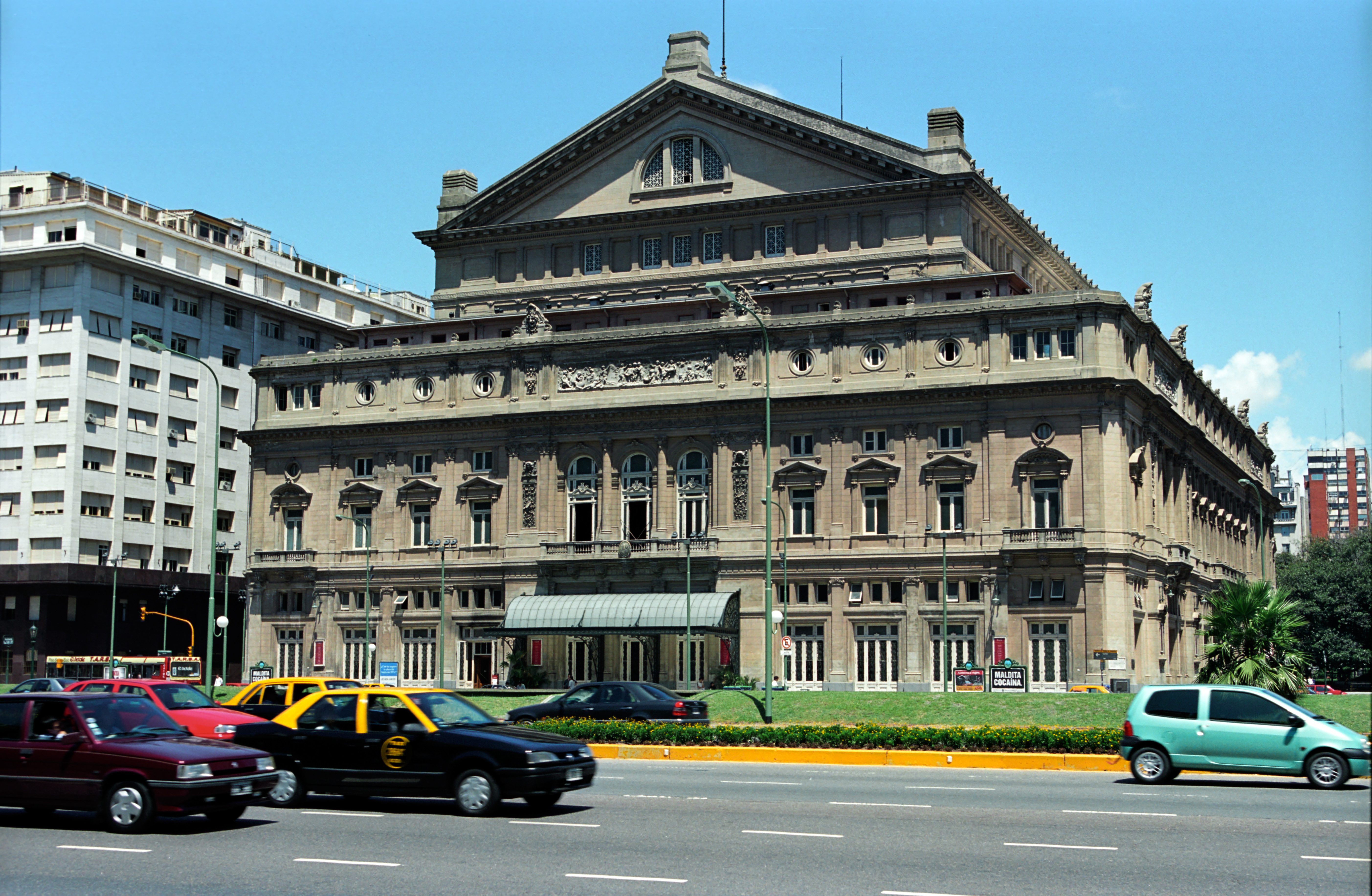 Teatro Colon, Buenos Aires